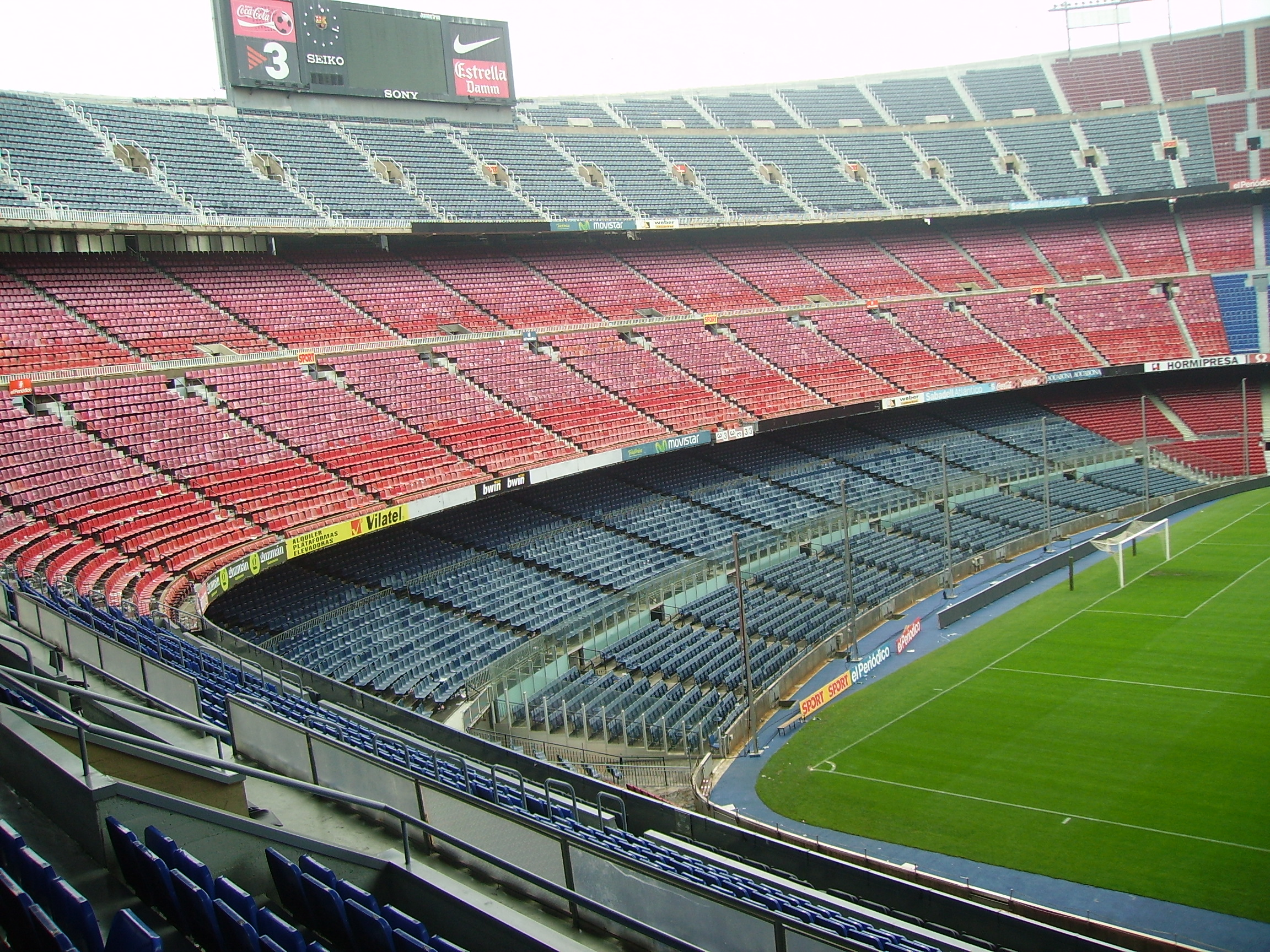 Una parte del Camp Nou di Barcellona